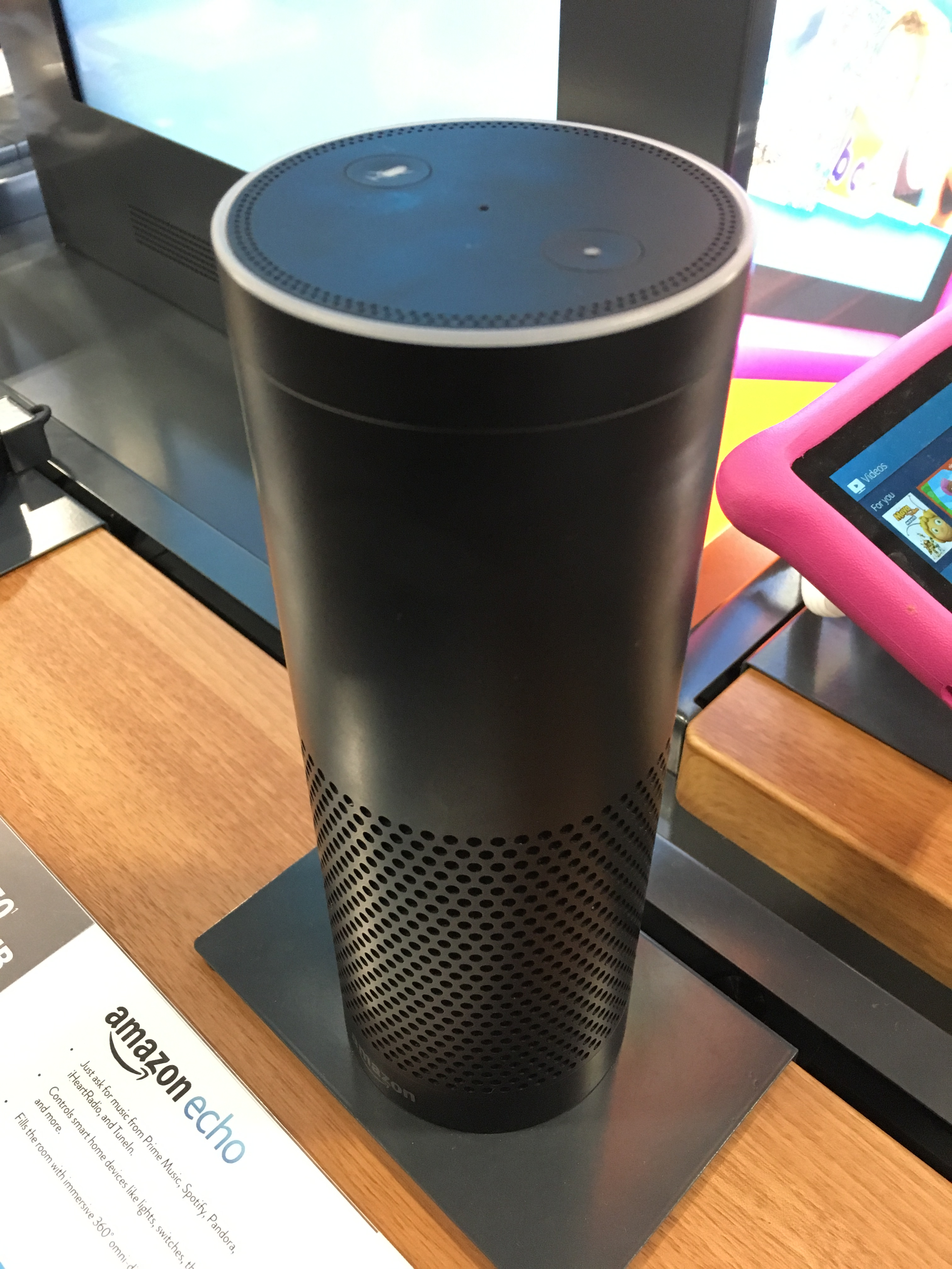 Amazon Echo